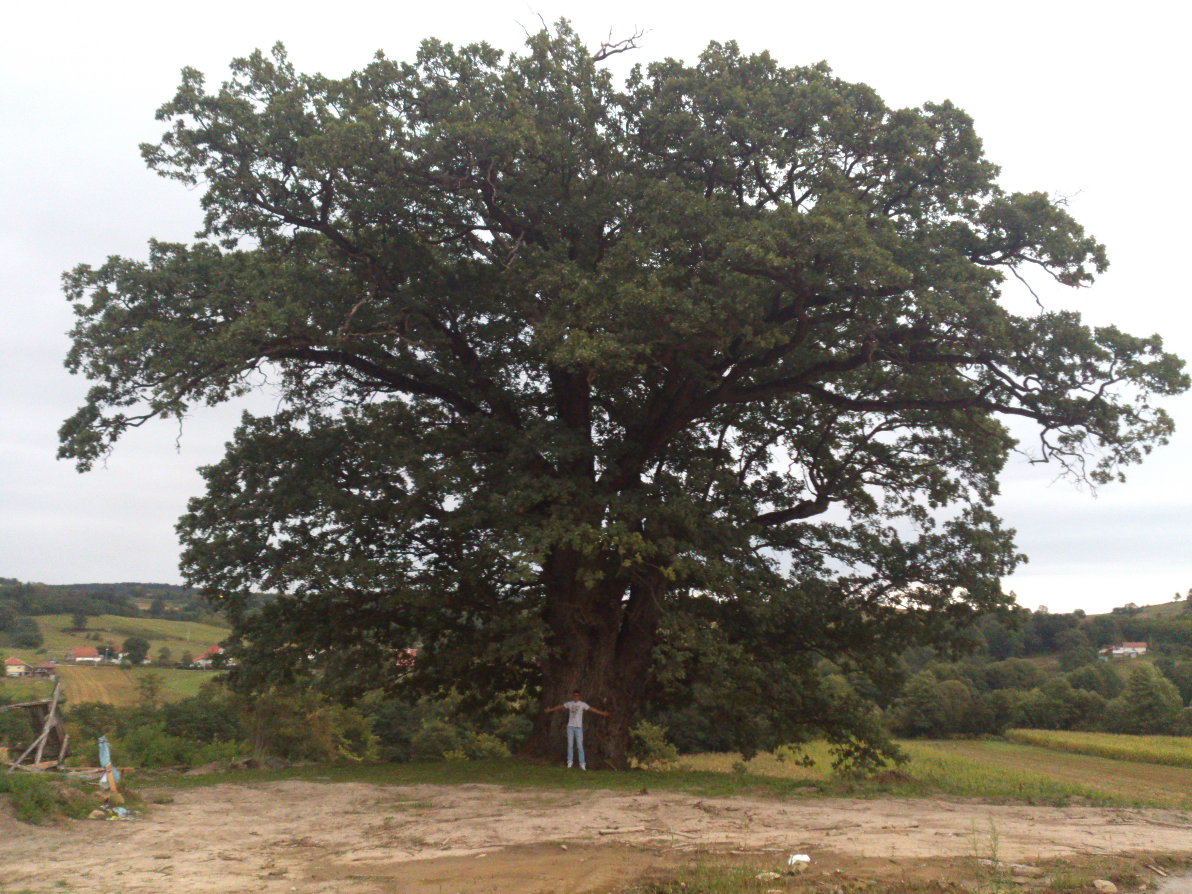 Запис чија је старост процењена на 600 година, у месту Росуље, село Шарани.